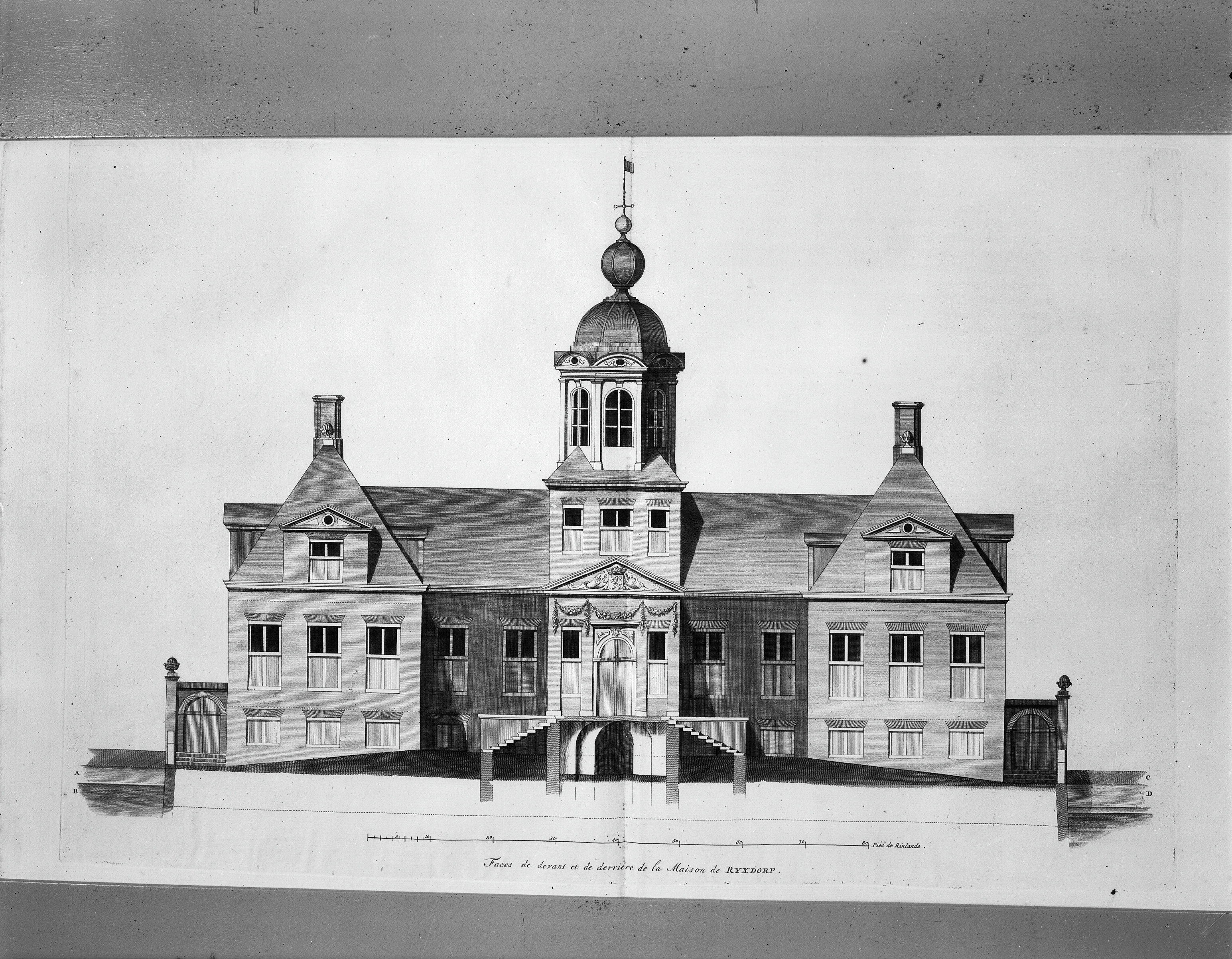 Landgoed Rijksdorp, tekening door P.Post